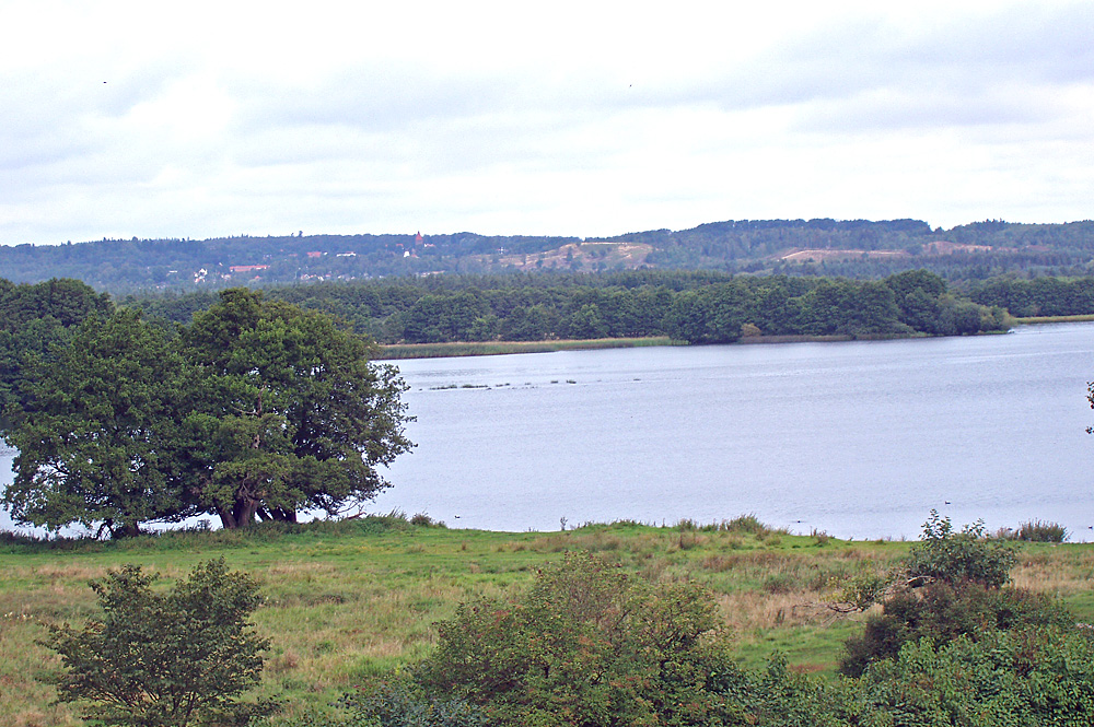 Mossø set fra sydvest ved Klostermølle. Skanderborg Amt Jylland , Denmark. Image by user:Nico-dk / Nils Jepsen